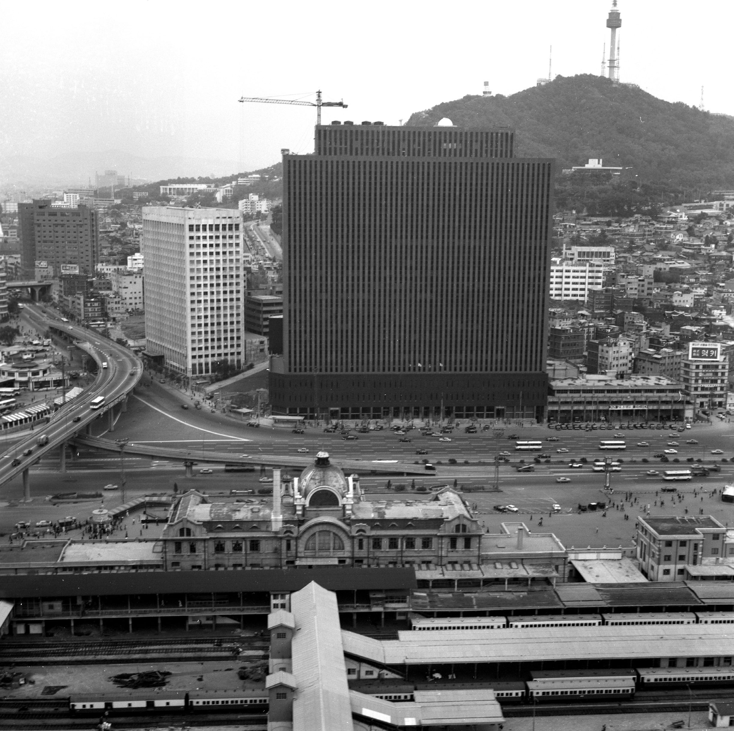 촬영일 : 1976년 11월 10일 촬영장소 : 대한민국 서울 대우빌딩 참석자 : 없음 관련내용 : 서울역 앞 대우빌딩 전경